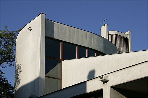 Katholische Kirche in Birsfelden